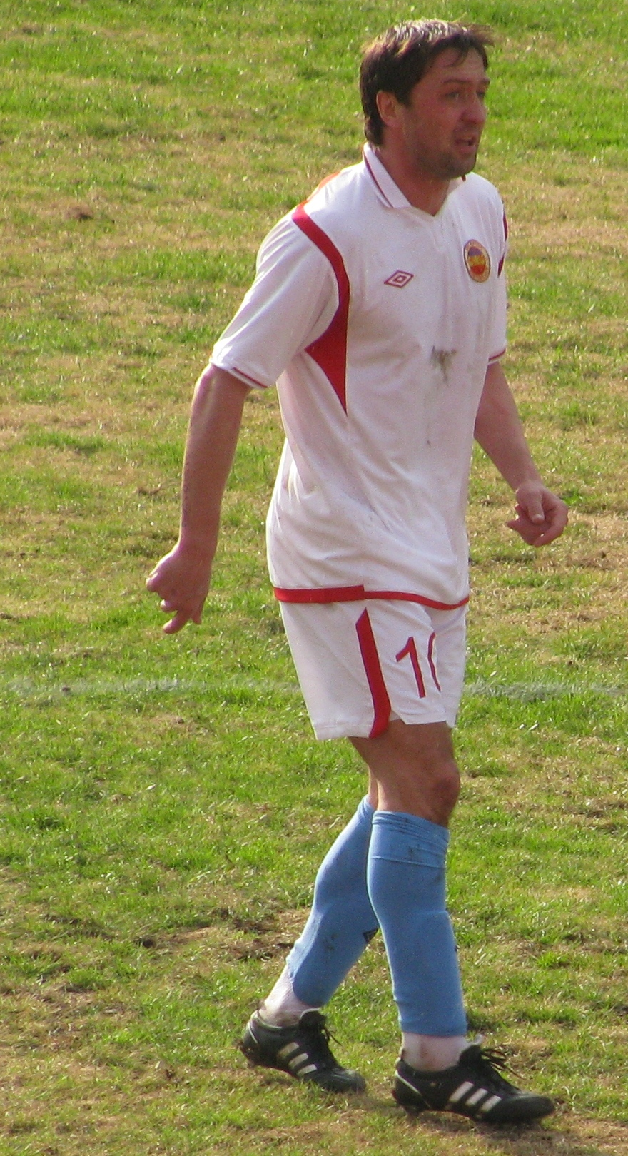 Осинов, Михаил Святославович, Mikhail Osinov // cropped from my own photo (3264x2448)